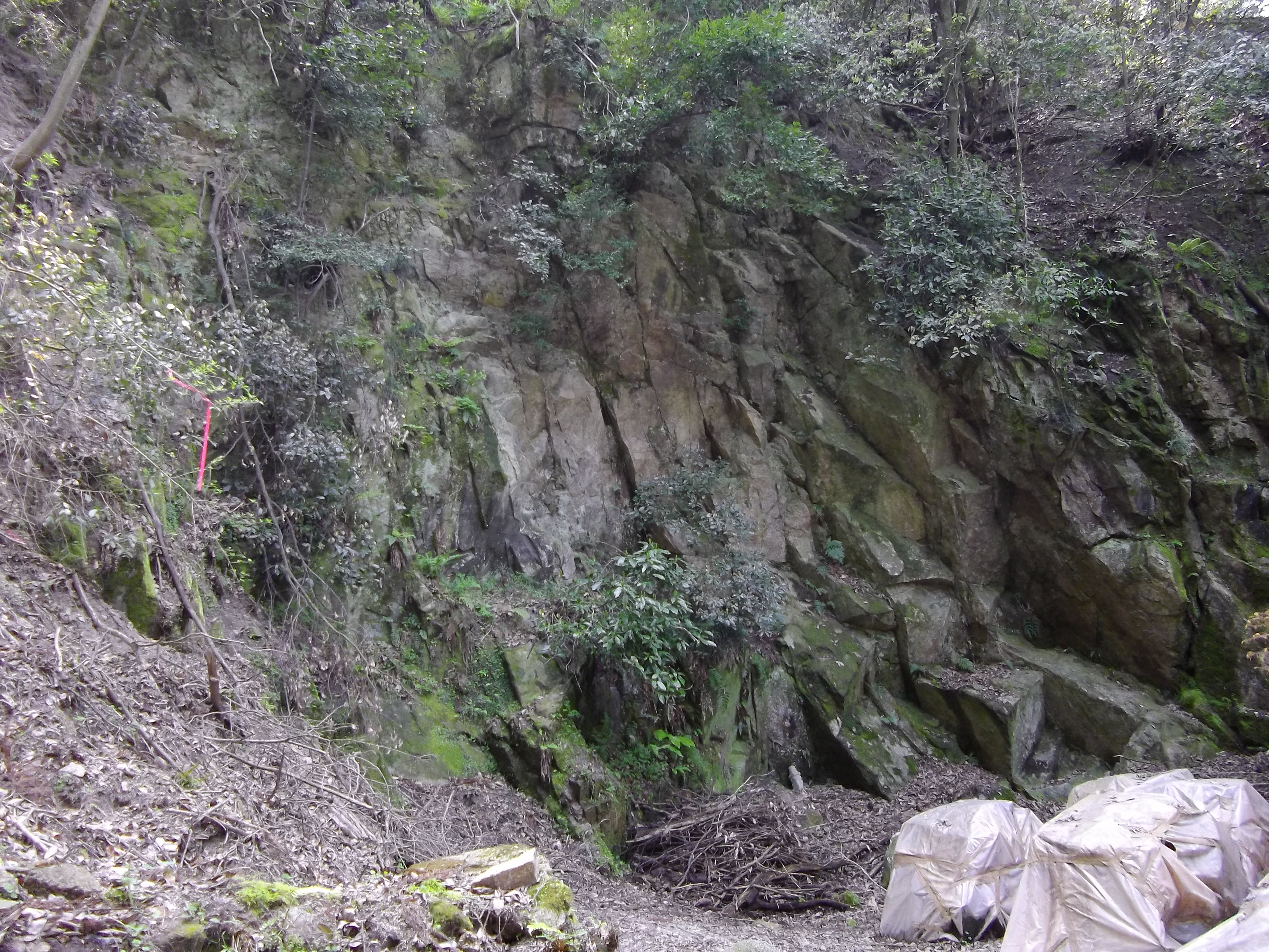 大文字山・太閤岩。砂防ダムの右手から旧道に分け入るとある。